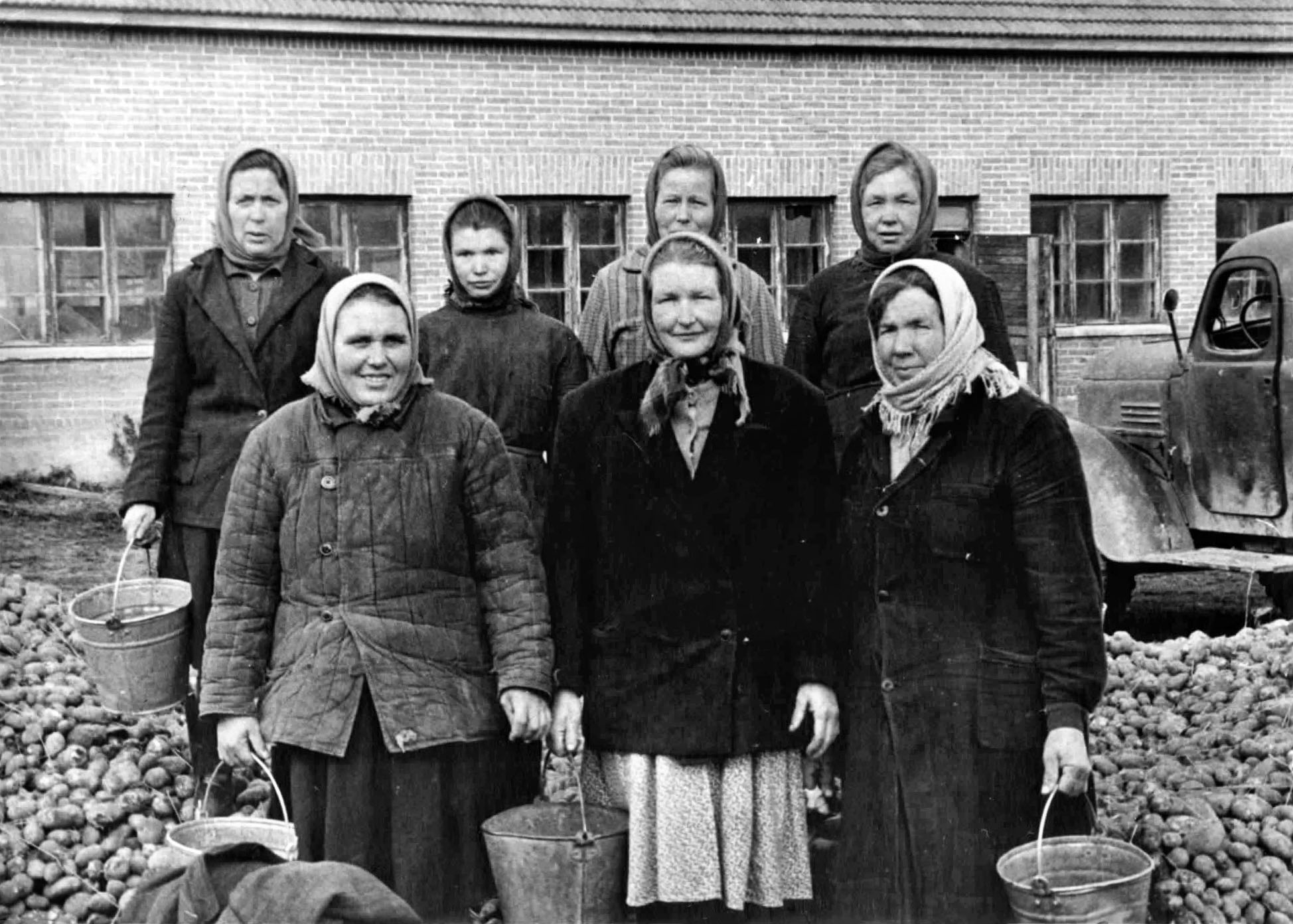 На фото здание скотного двора. Финская постройка. В нем содержались коровы. Кирпичное. Пол был забетонирован, вмонтированы в пол автопоилки. Вода подавалась в коровник. На крышу имелась возможность заезжать технике, чтобы завозить сено, там оно и хранилось. Вокруг видно много картофеля: его собирали студенты техникума, а работницы совхоза его перебирали и закладывали на хранение в овощехранилище.